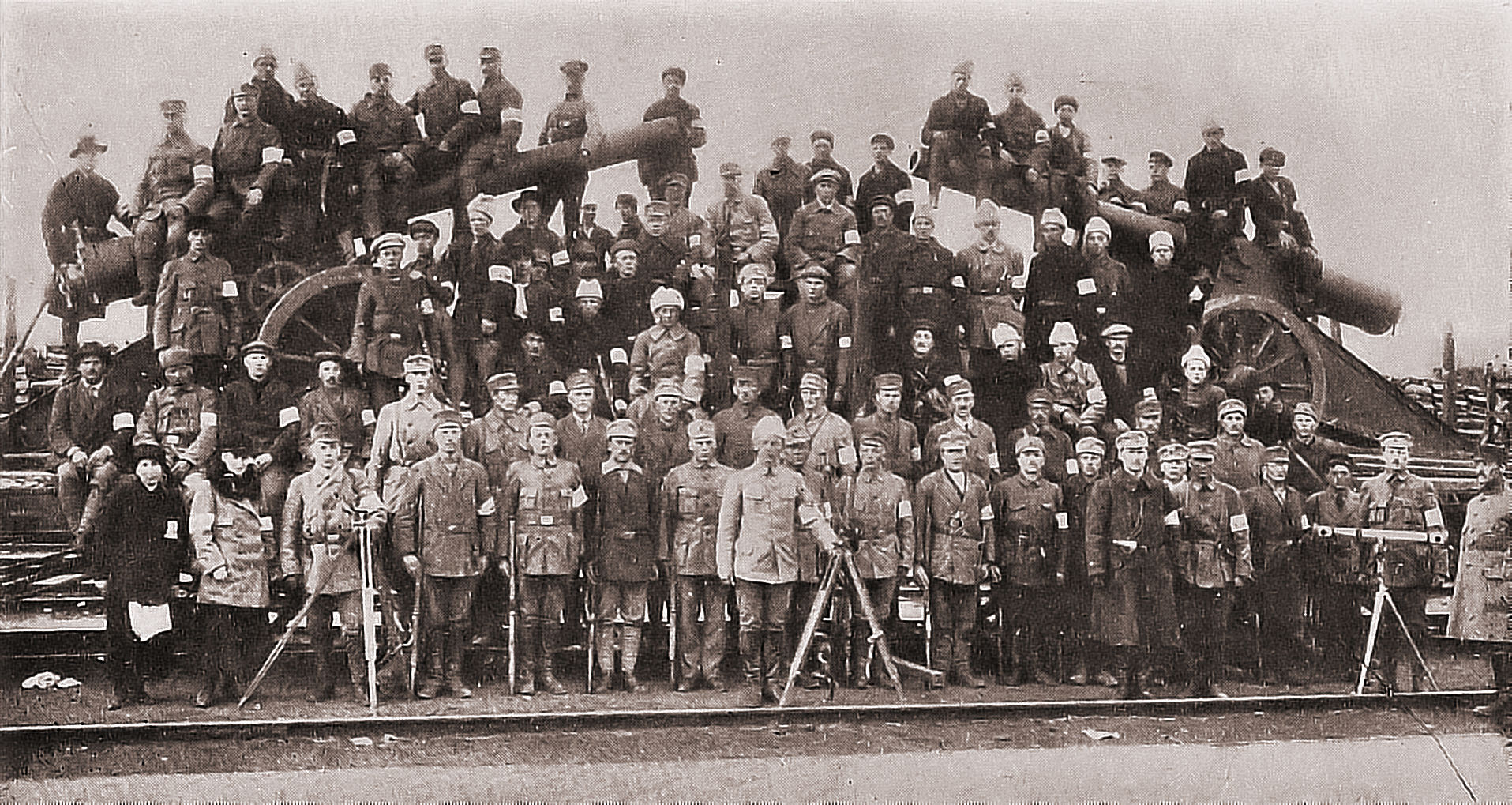 Description